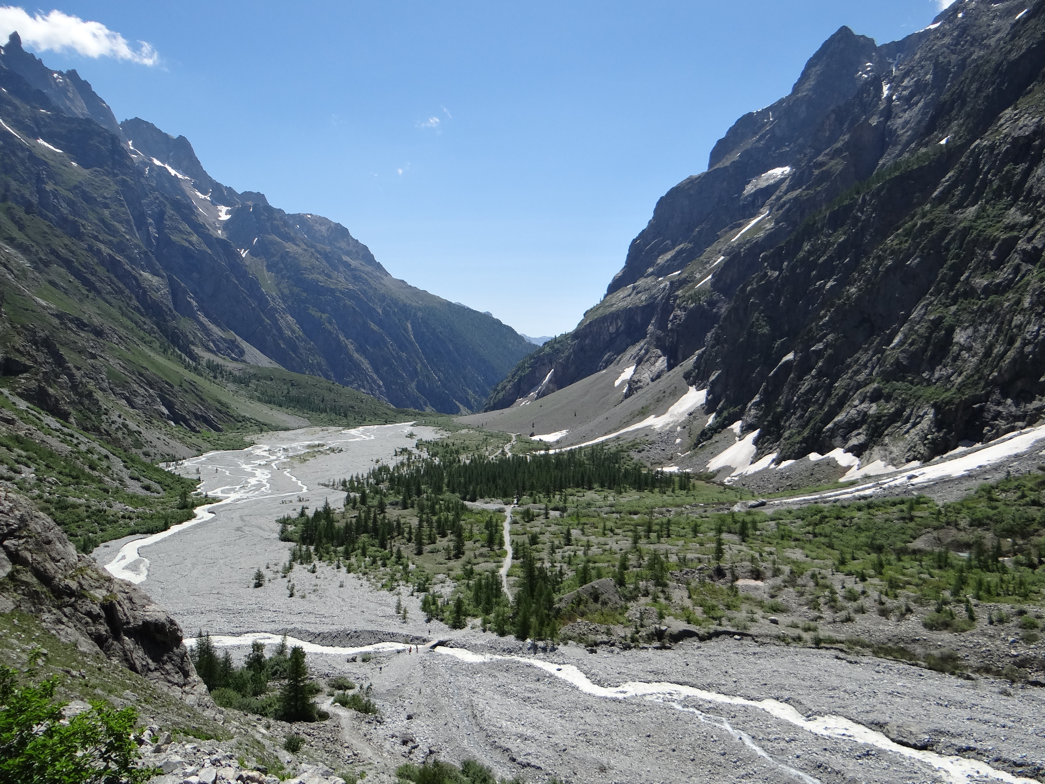 Pré de Madame Carle - Vue d'ensemble du pré de Madame Carle prise du chemin montant aux glaciers